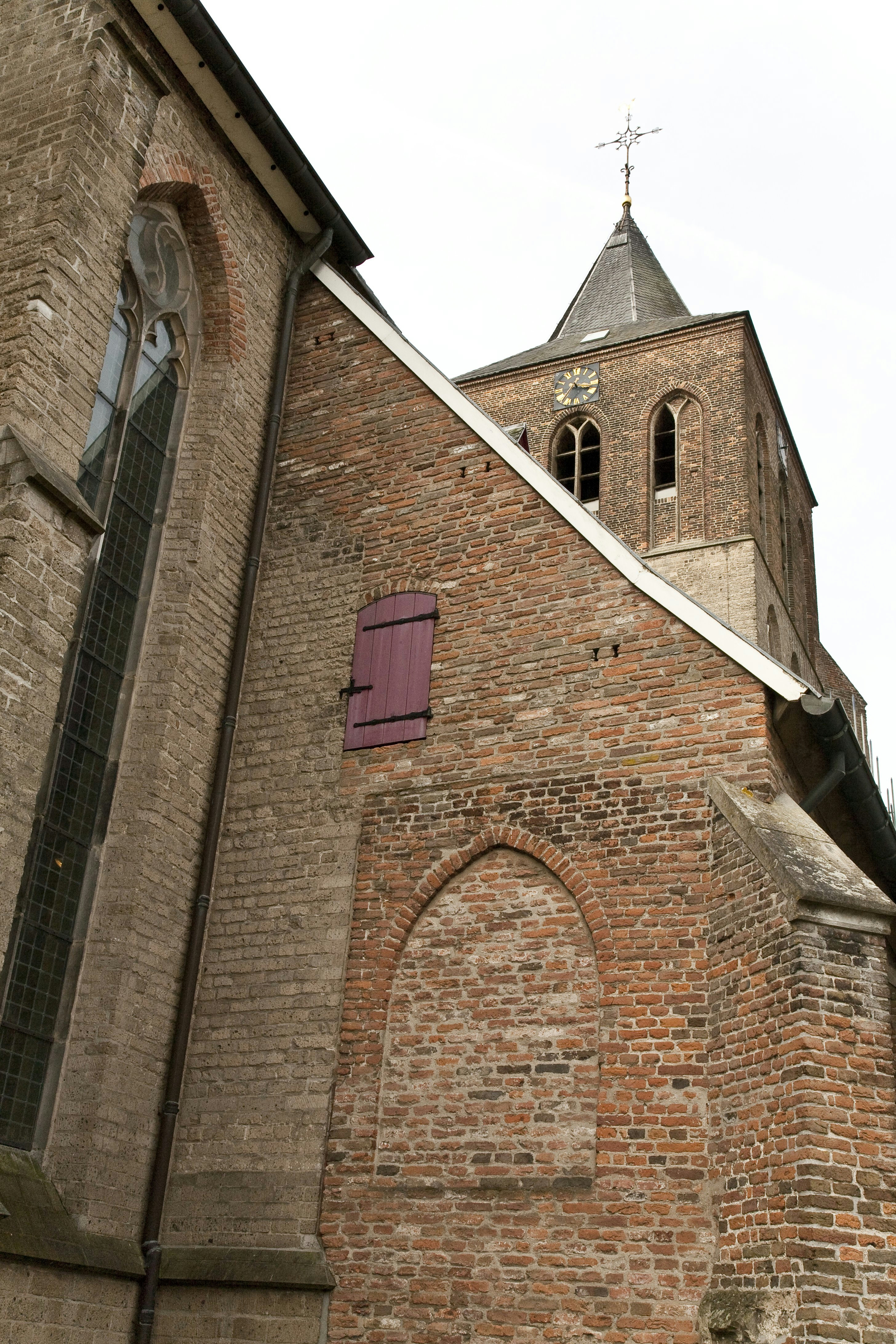 ROOMS-KATHOLIEKE KERK (SINT MARTINUS): Detail noordgevel met dichtgemetseld venster (opmerking: Publicatie: TRAP Pannerdensch Kanaal (Cultuurhistorische Routes in Nederland - 58))